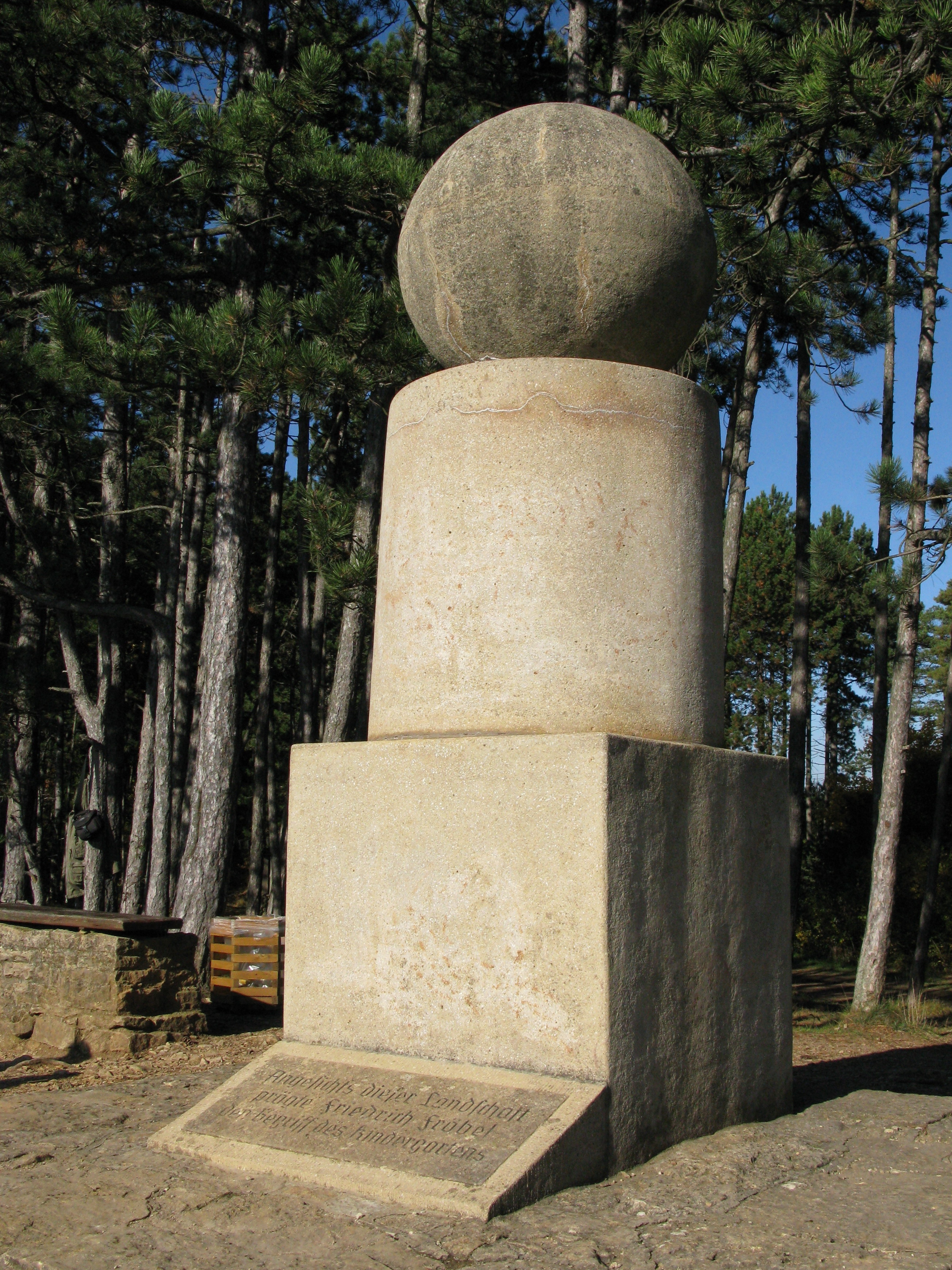 Friedrich Fröbel Denkmal zwischen Keilhau und Bad Blankenburg (kennzeichnet jene Stelle an der Fröbel den Namen „Kindergarten“ geprägt haben soll)